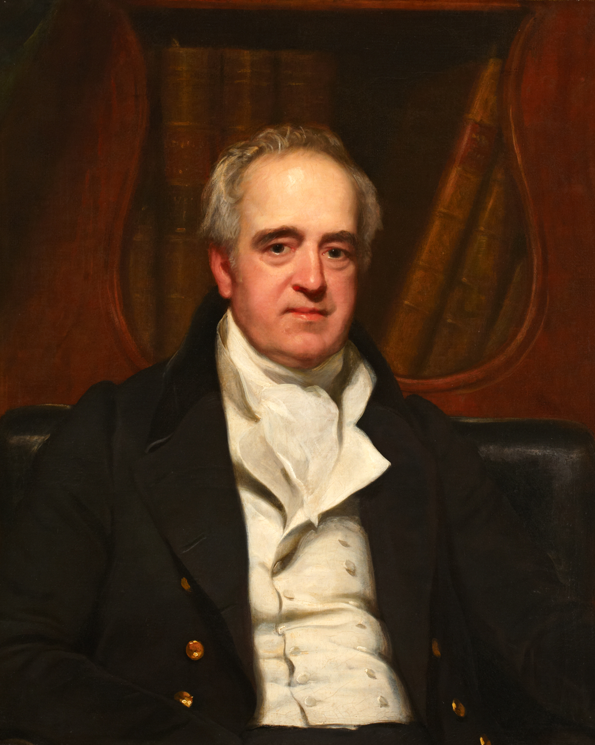 John Richard Farre